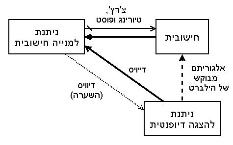 תכונות של קבוצות - איור לצורך הבעיה העשירית של הילברט. made by: he:משתמש:עוזי ו.